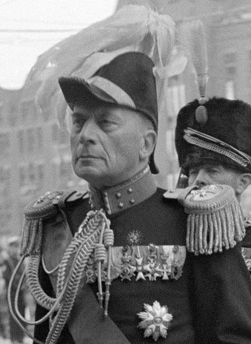 Luitenant-generaal Jan Joseph Godfried baron van Voorst tot Voorst (1880-1963)